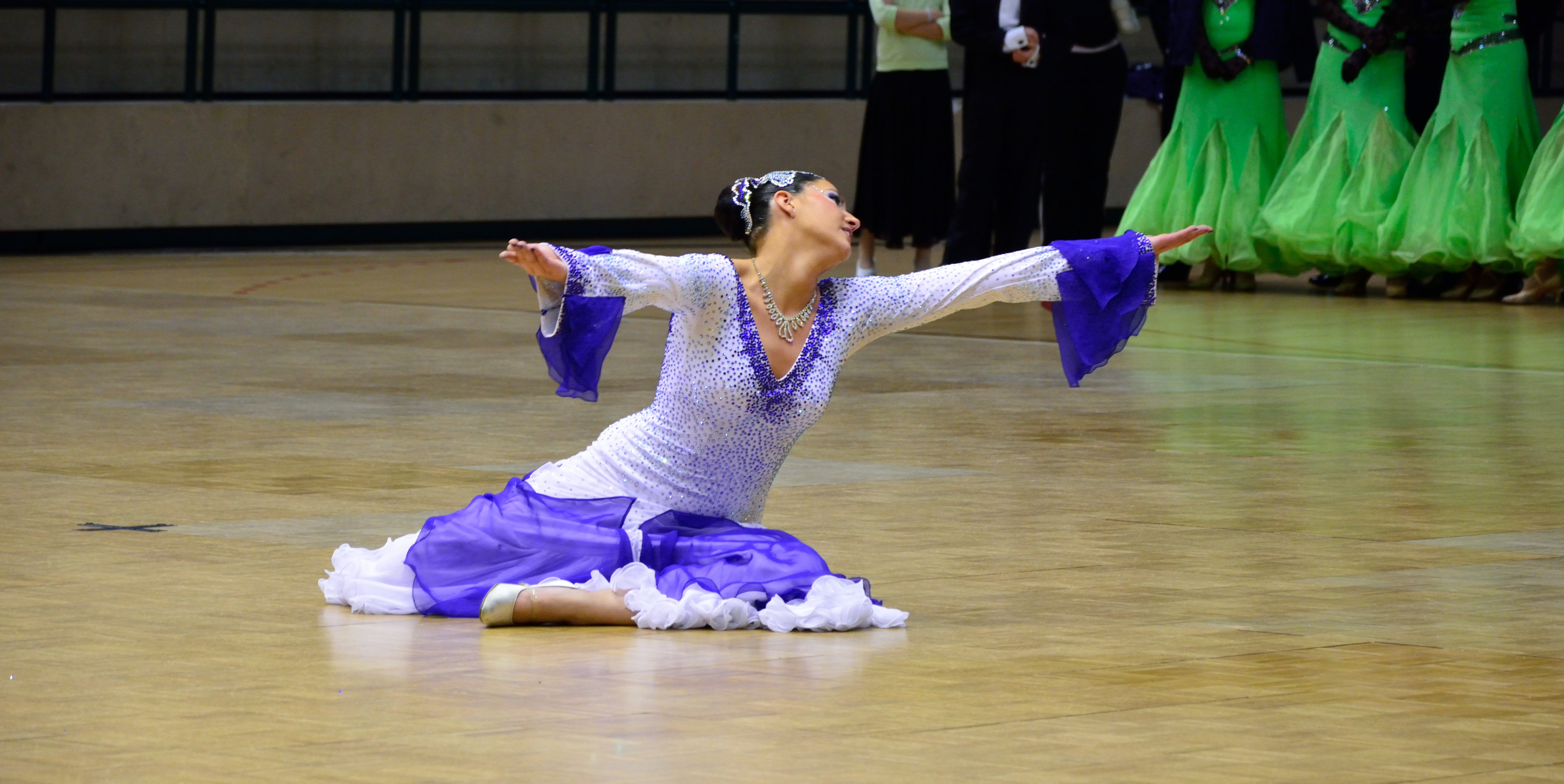 Auszug aus dem Endbilder der Choreographie "Phantom der Oper" von Holger Jäckel